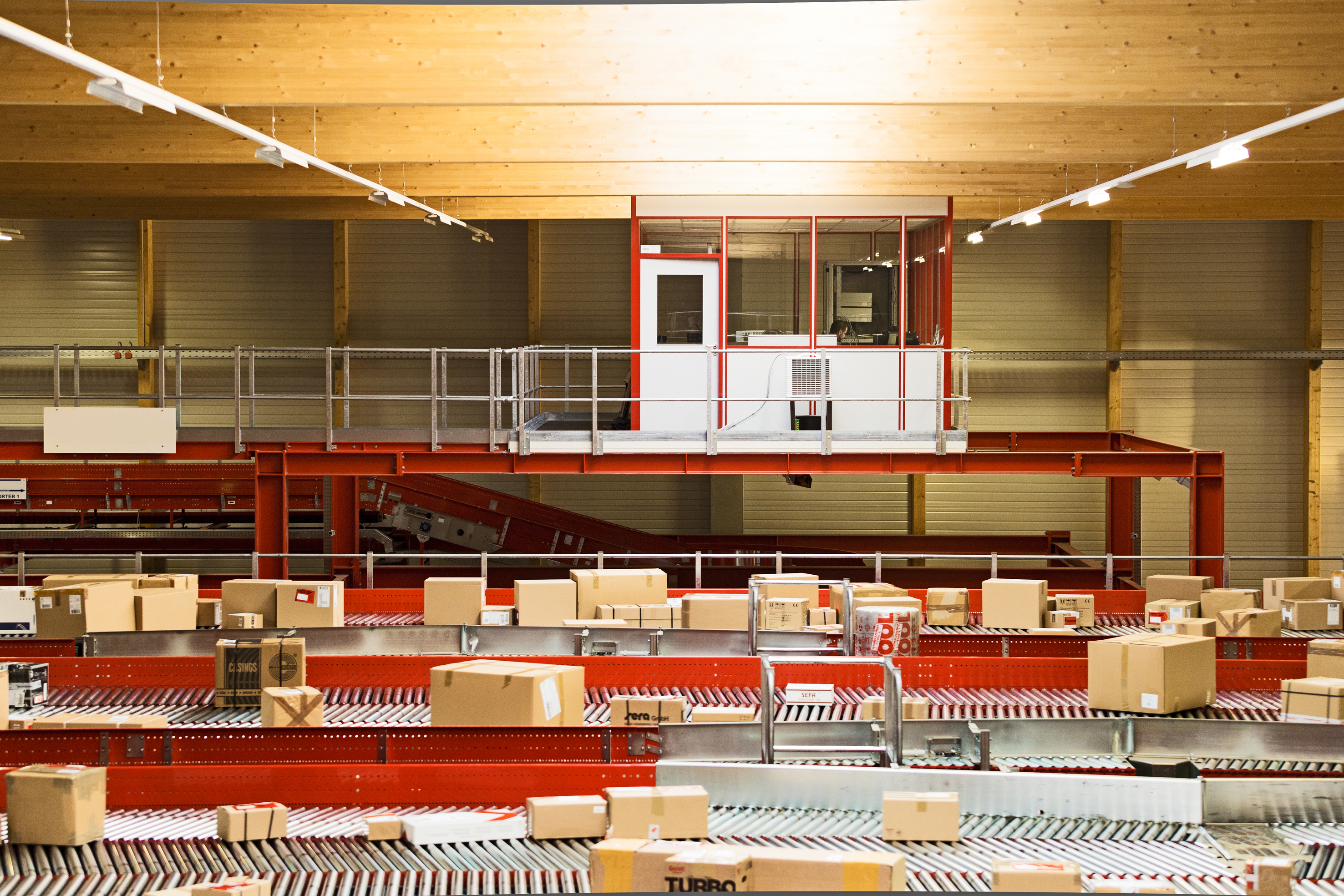 DPD Depot in Nürnberg von Innen (sichtbar: Kontrollraum und Linemaster)